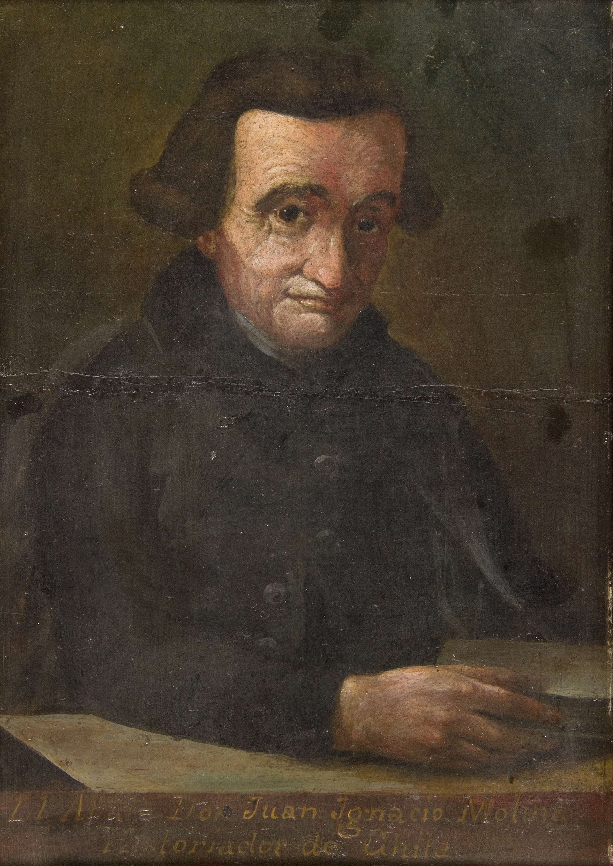 Juan Ignacio Molina, también conocido como abate Molina y en Italia como Giovanni Ignazio Molina (Hacienda "Huaraculén", comuna de Villa Alegre, Chile, Imperio español, 24 de junio de 1740-Bolonia, provincia de Bolonia, Italia, 12 de septiembre de 1829), fue un sacerdote, naturalista, geógrafo y cronista hispano-chileno.